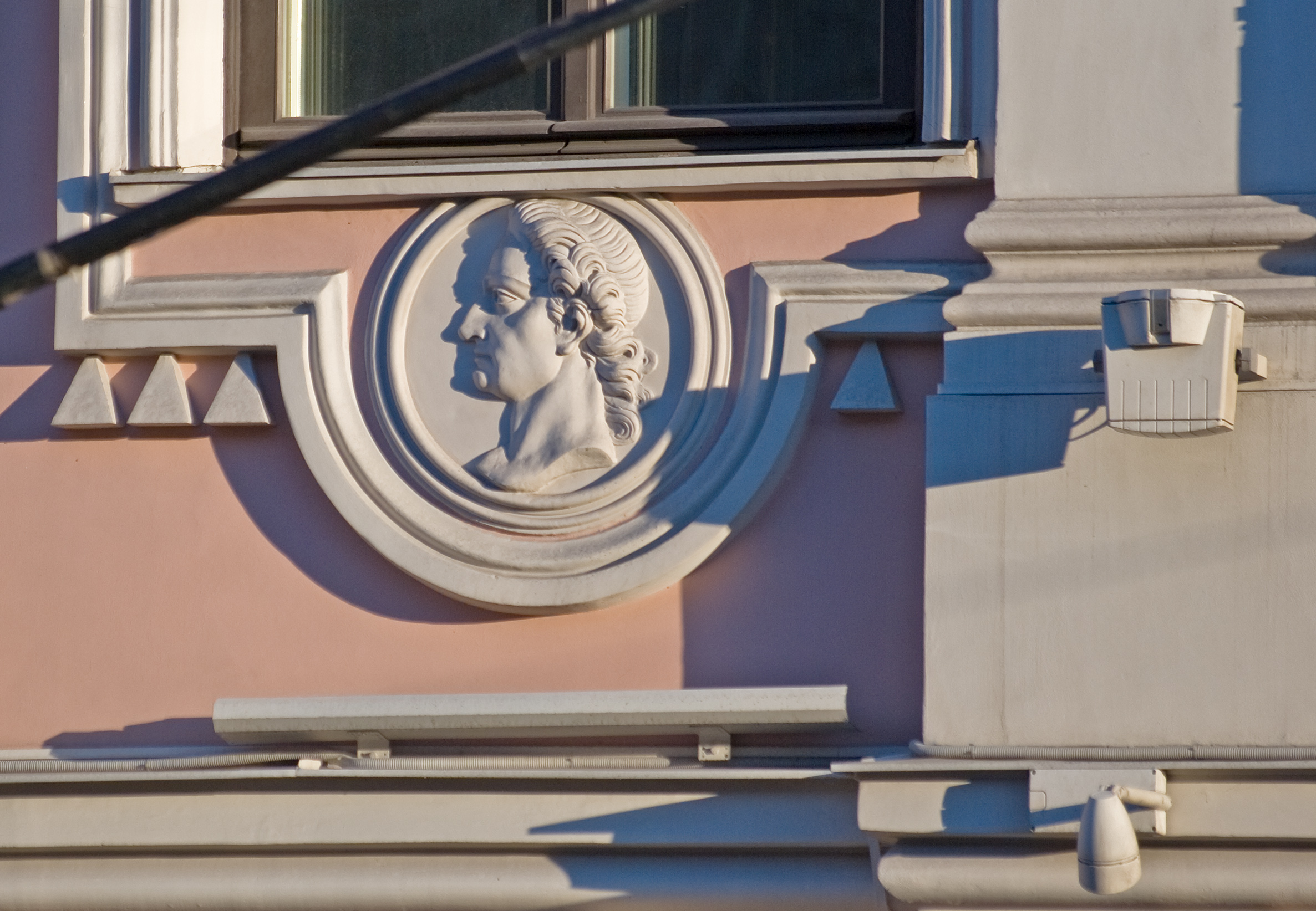 Строгановский дворец, Санкт-Петербург. Фрагмент.